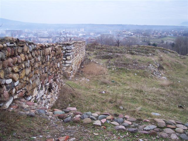 Описание: Развалините на античната и средновековна крепост в Монтана Източник: собствена фотофграфия Фотограф: Емил Петров Дата на заснемане: 31 декември 2004